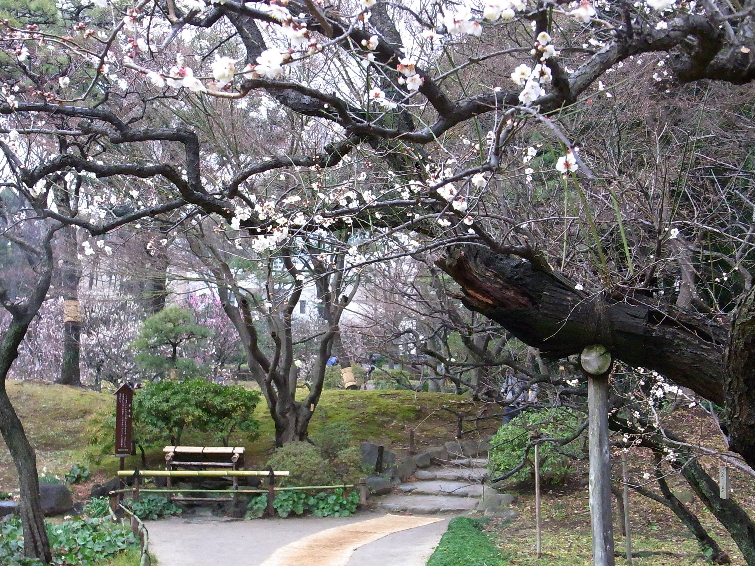 梅まつり（2011.2.12）